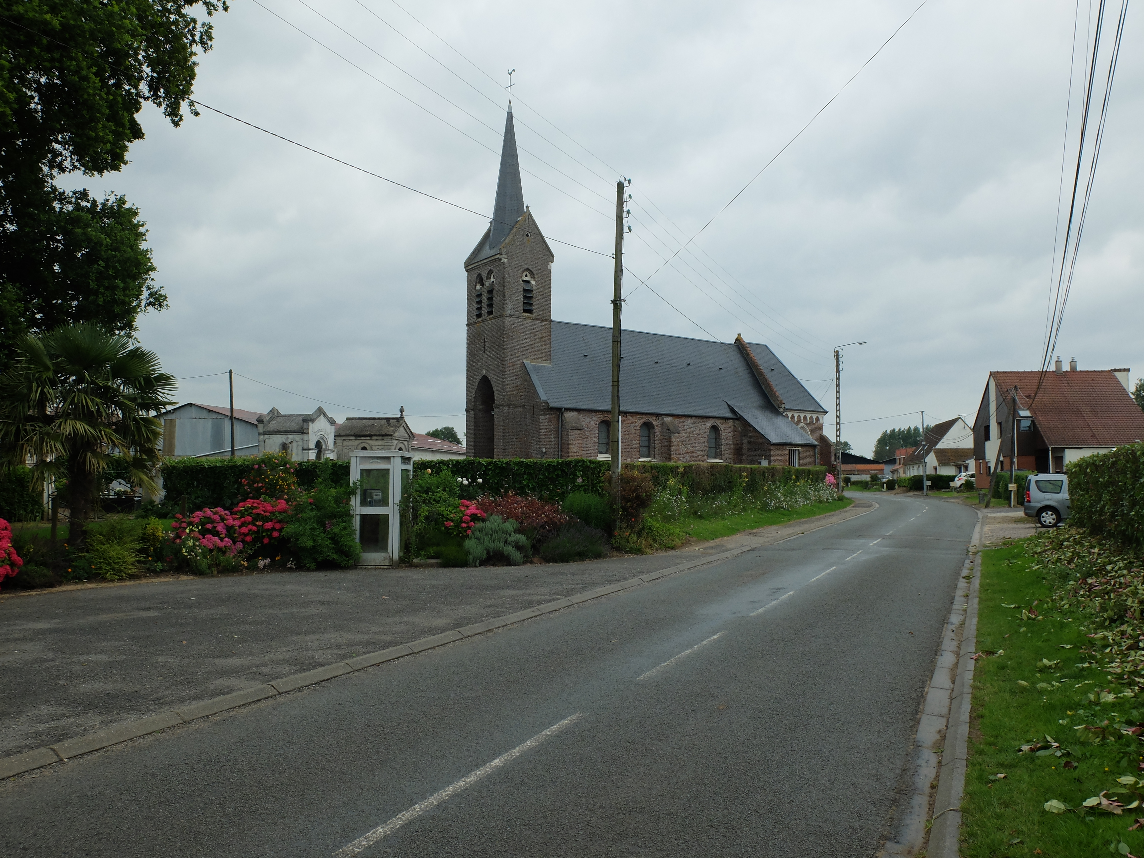 Vue du centre de Brévillers (Pas-de-Calais), avec l'église Saint-Firmin.